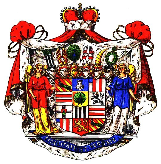 Wappen der Fürsten zu Wied